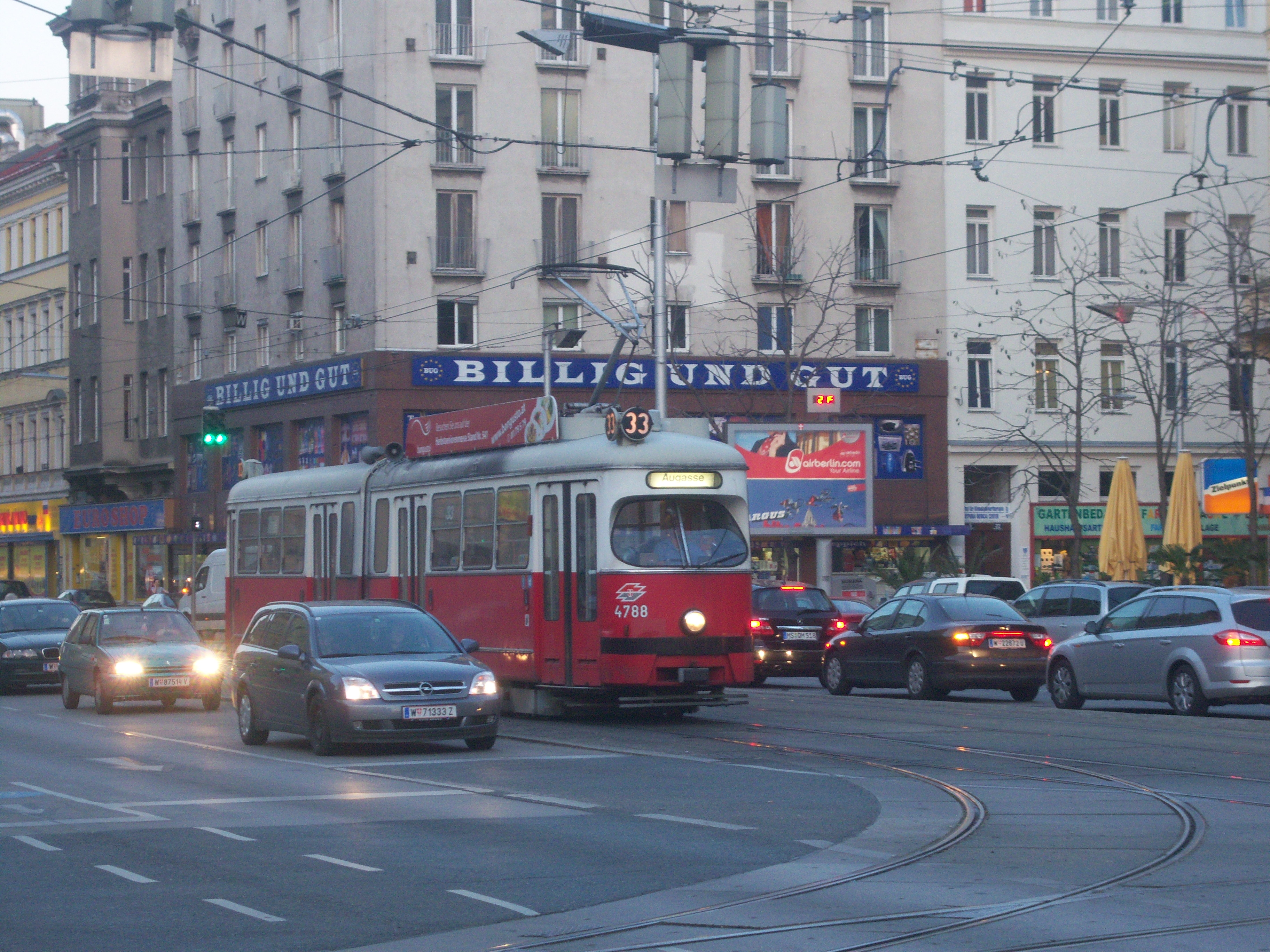 Linie 33 am Julius-Tandler-Platz